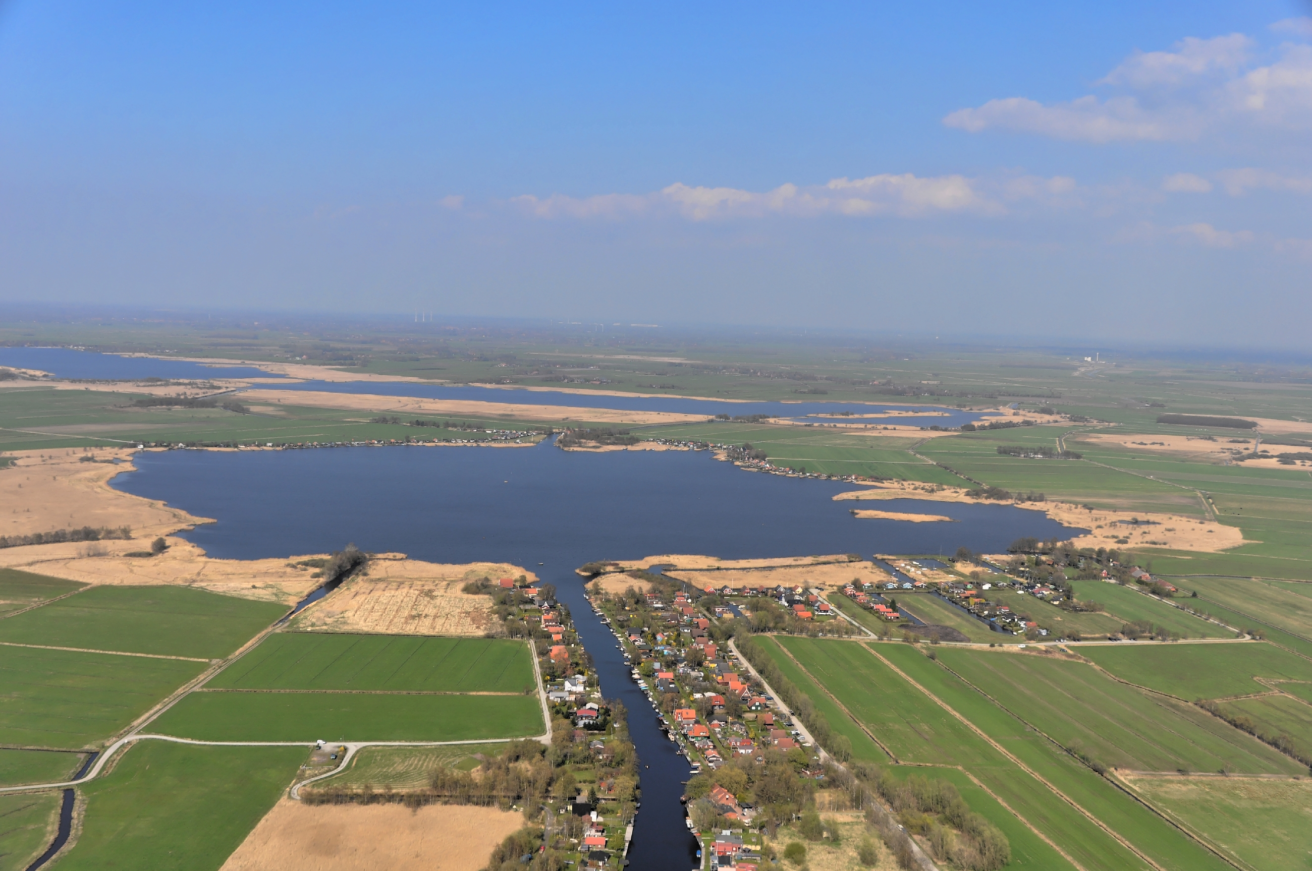 Luftbilder von der Nordseeküste 2013-05